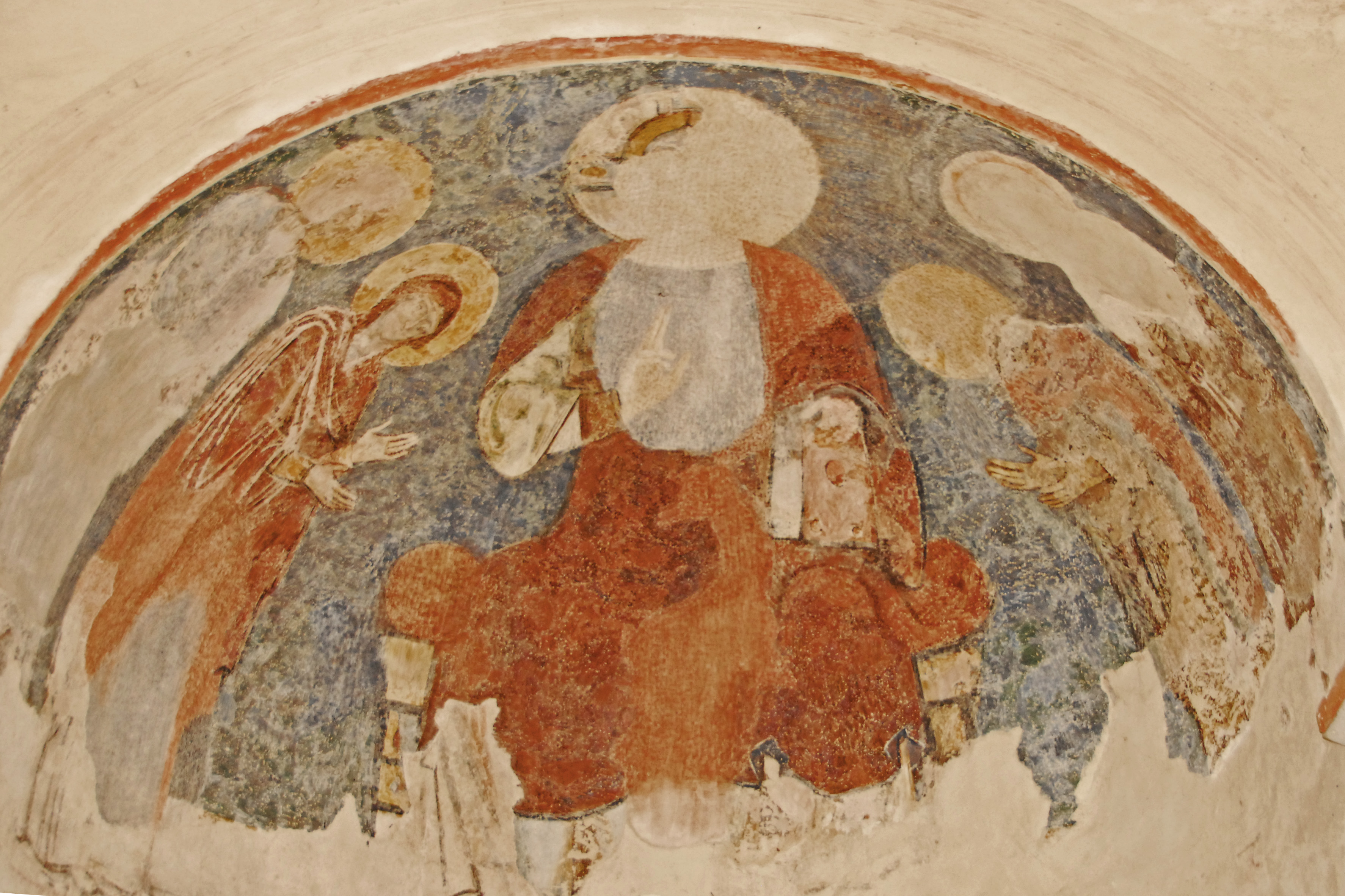 St.-Jean Glaine-Montaigut, Fresko Chorapsis